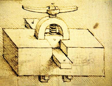 рисунок Леонардо да Винчи - Машина для изготовления пружин